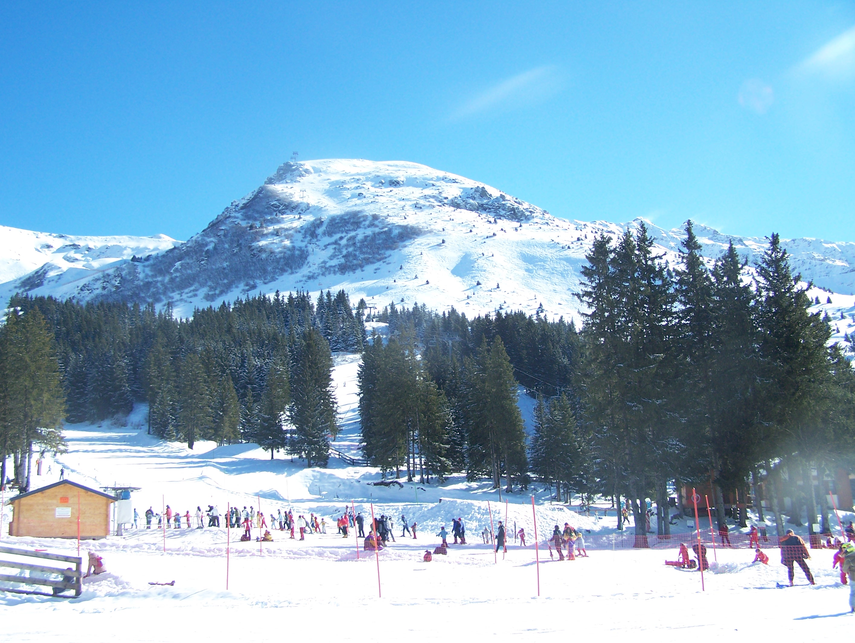 The Sept Laux ski resort (France).